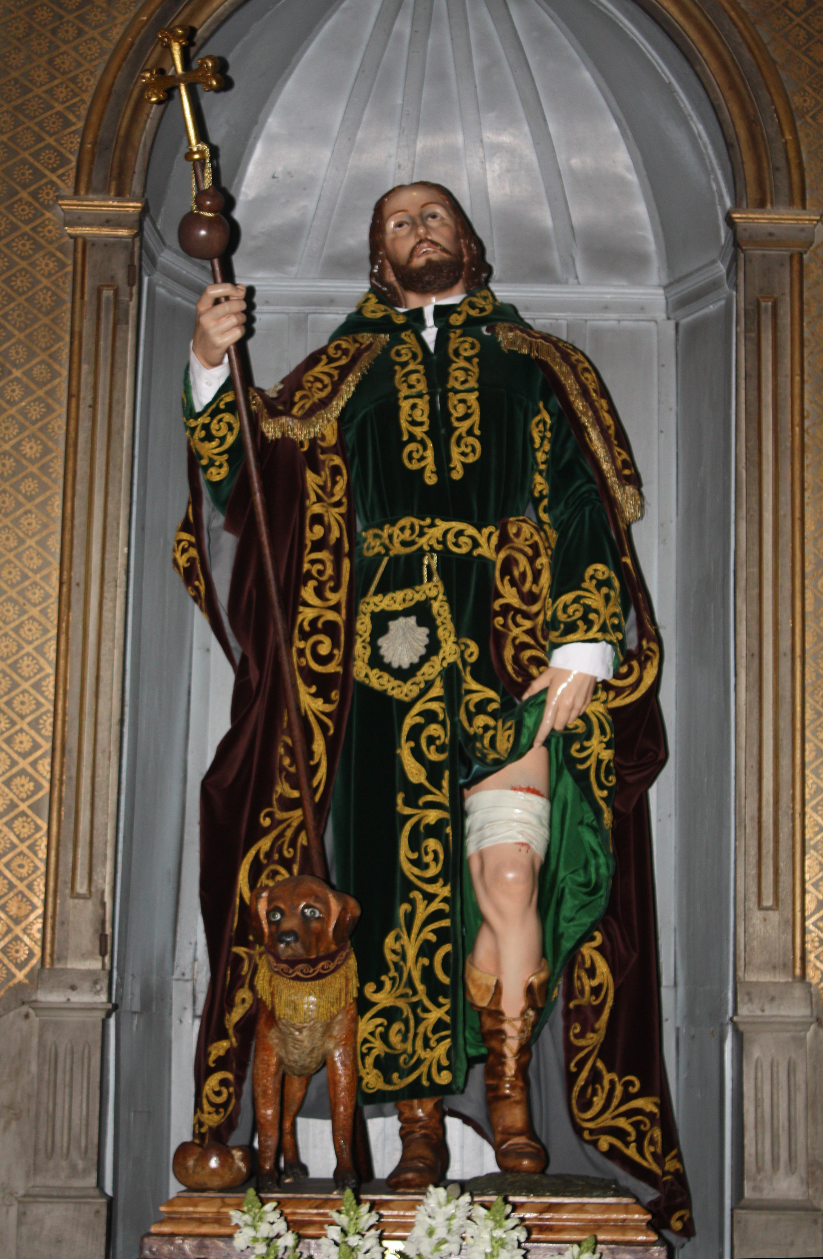 Estatua de San Roque, na igrexa de San Francisco (Cambados, Pontevedra)